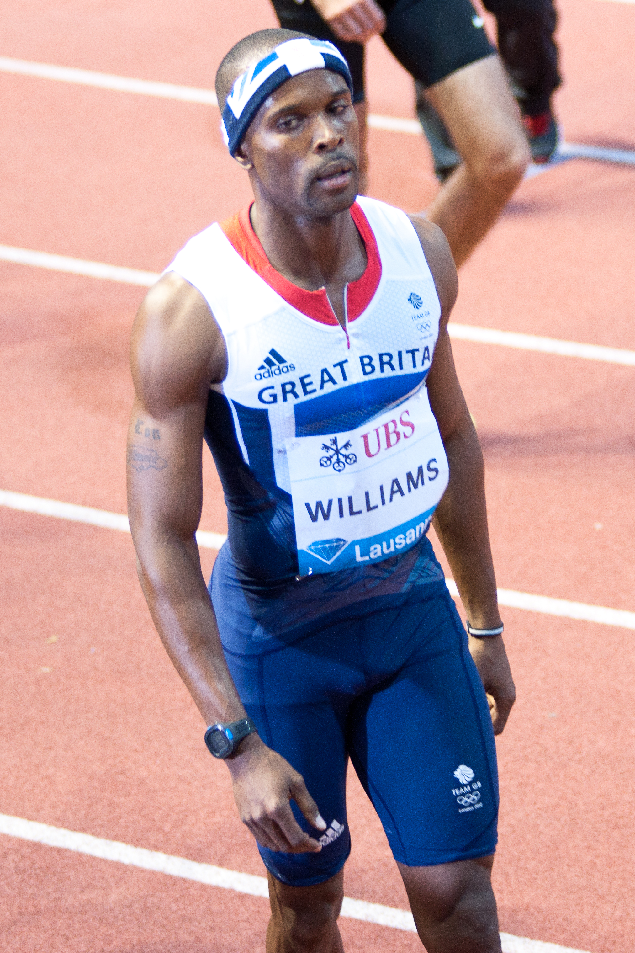 Athletissima 2012 - Conrad Williams